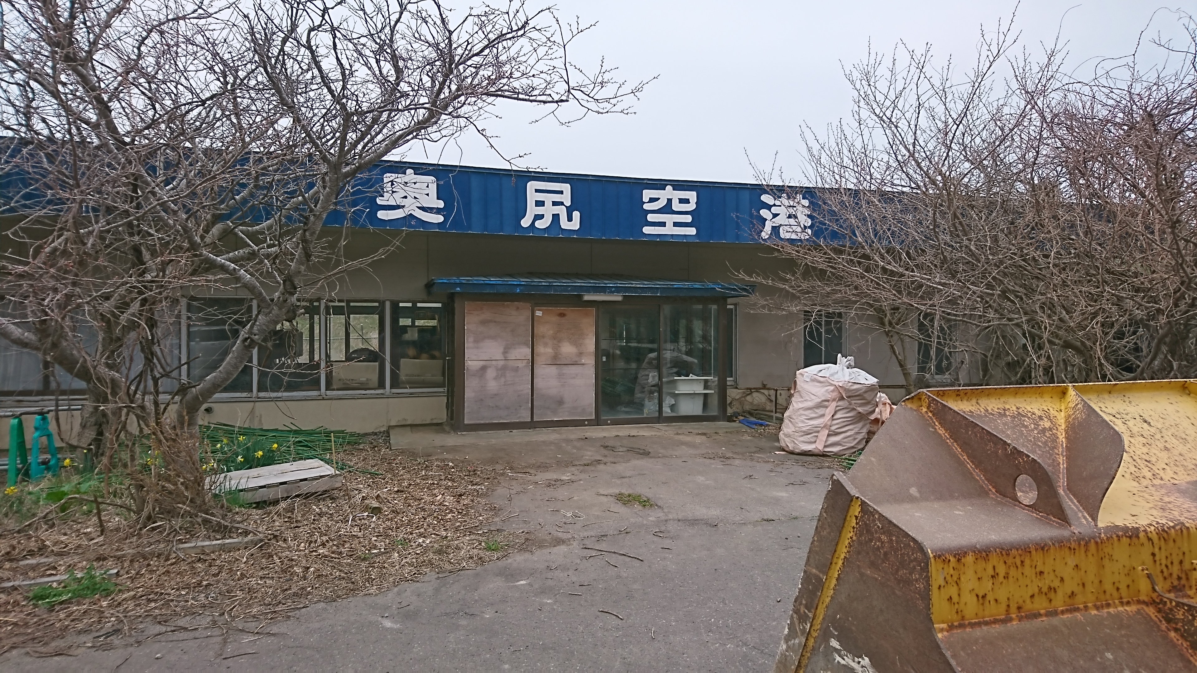 旧奥尻空港ターミナルビル